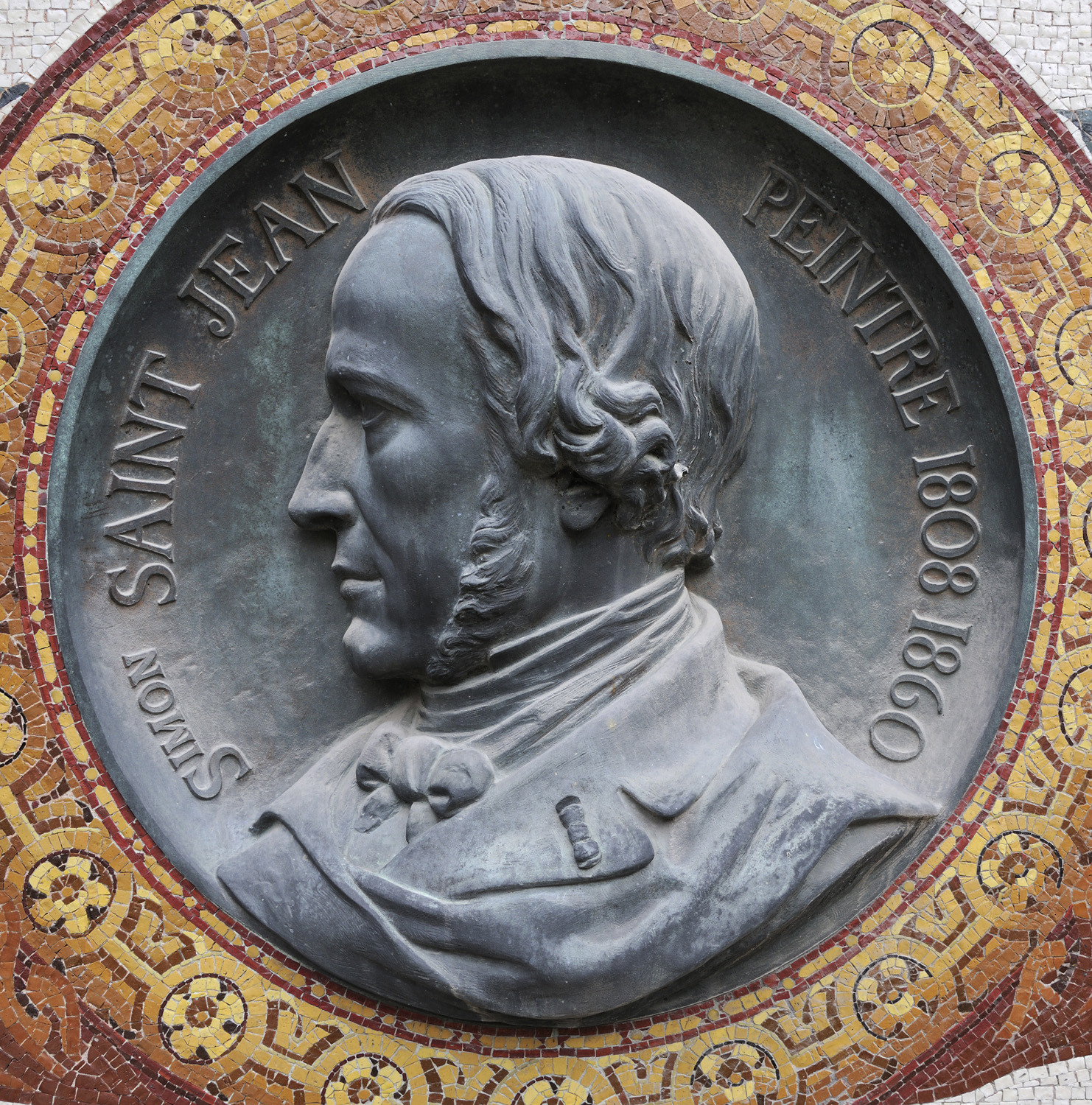 Médaillon de bronze à l'effigie de Simon Saint-Jean, Joseph Hugues Fabisch